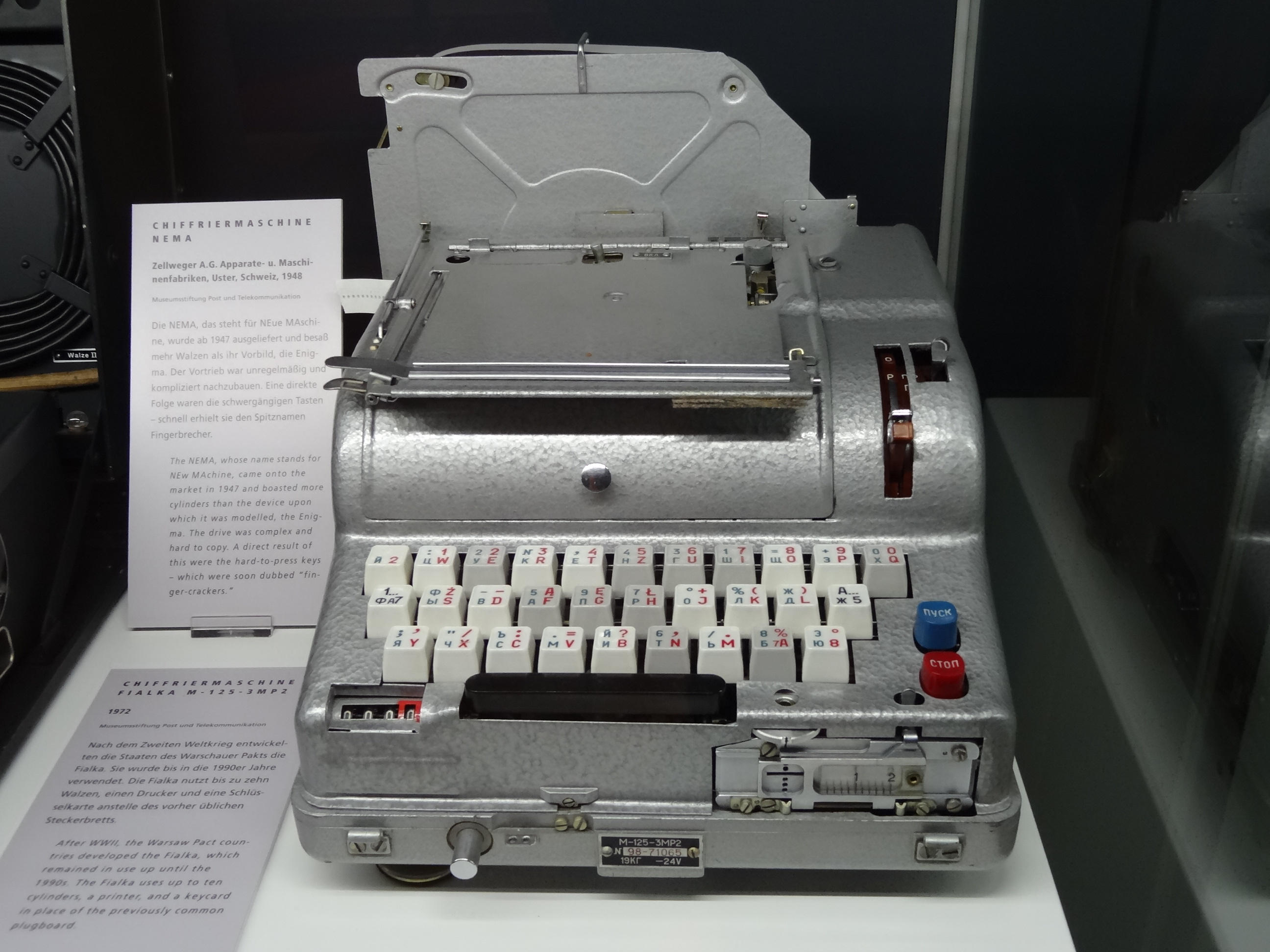 Chiffriermaschine, Warschauer Pakt, 972